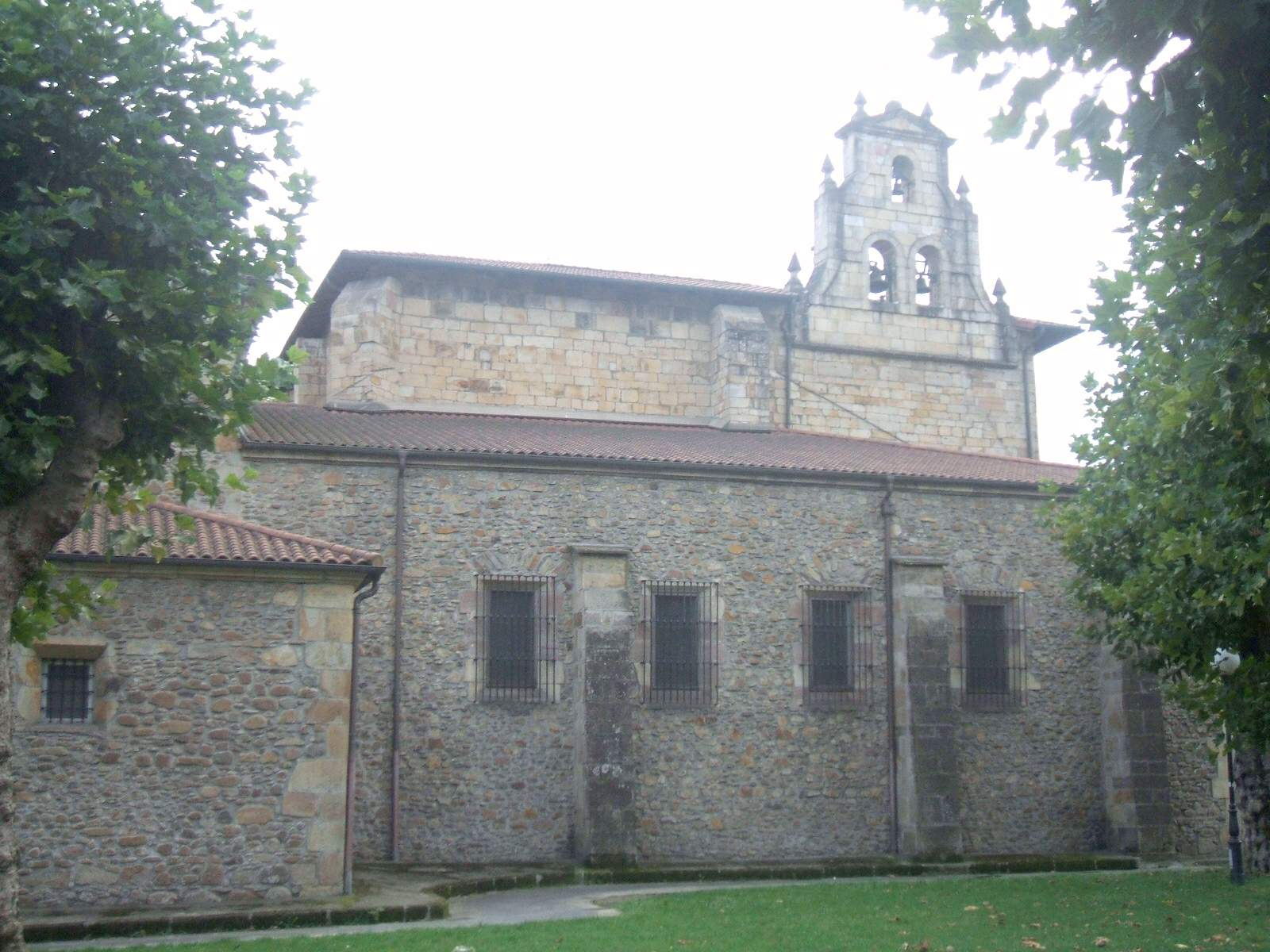 Iglesia de San Pedro de Tabira (Durango, Bizkaia)